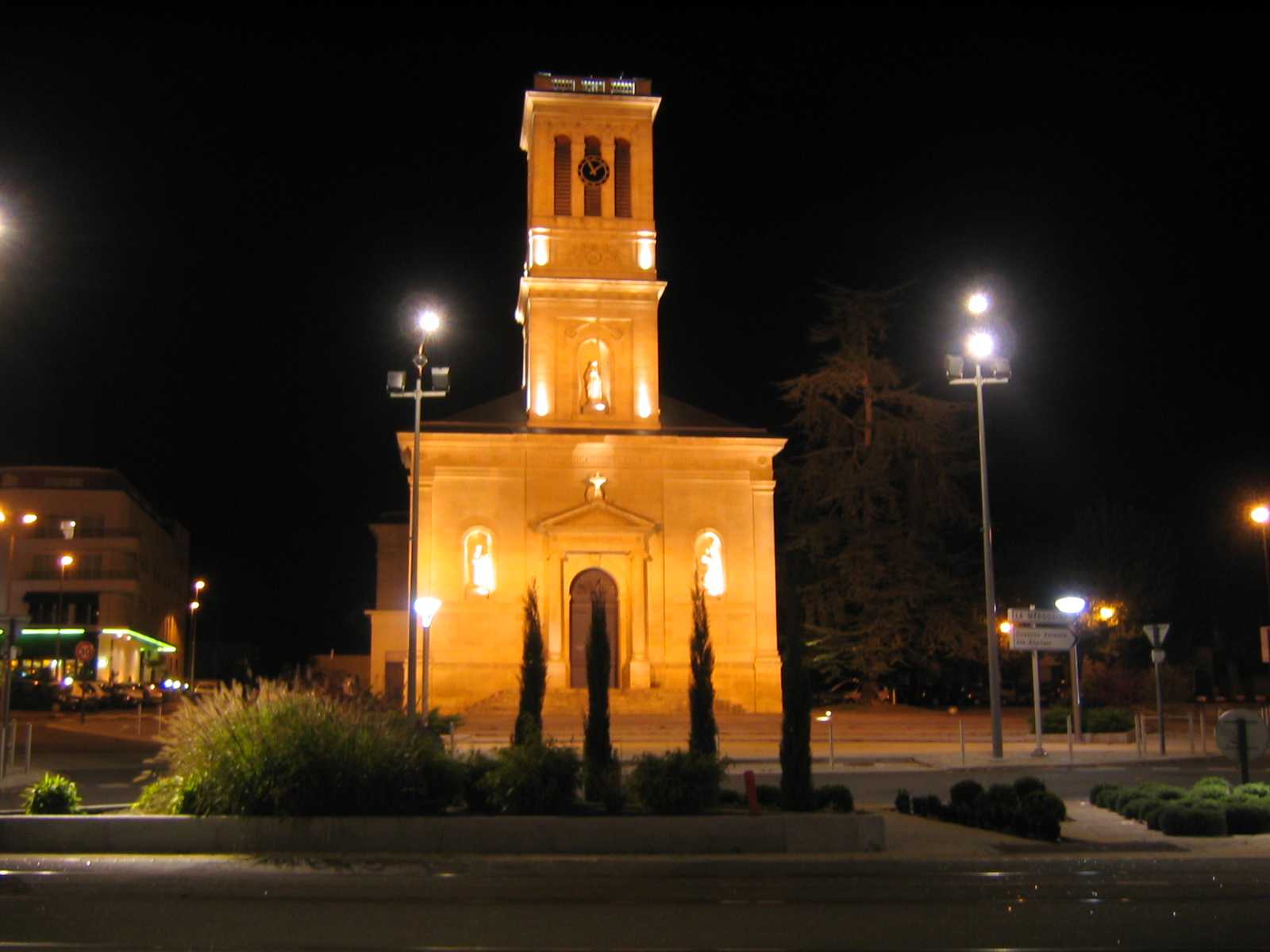 Église de Talence illuminée